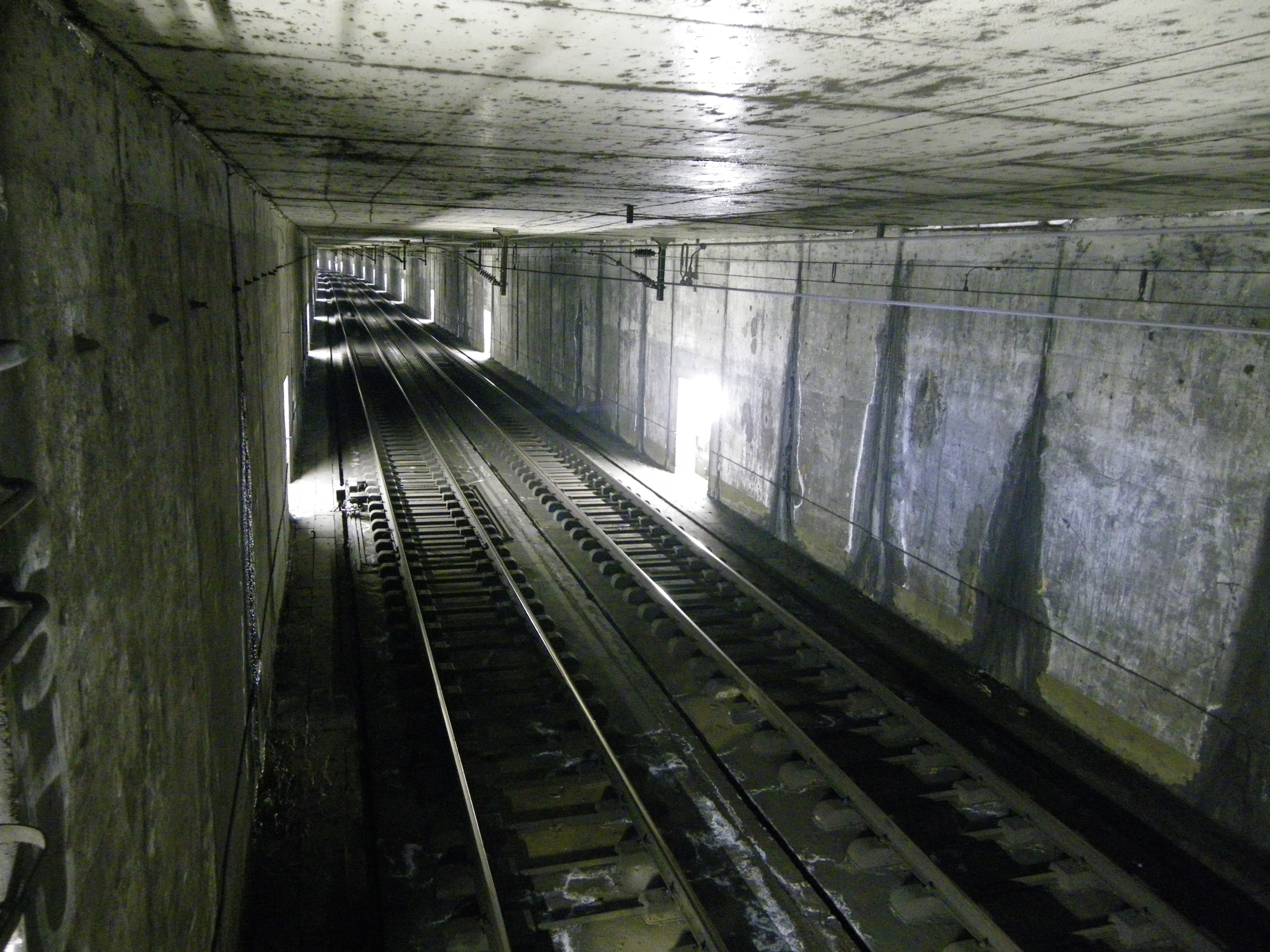 Tunnel RER Sevran sud-ouest